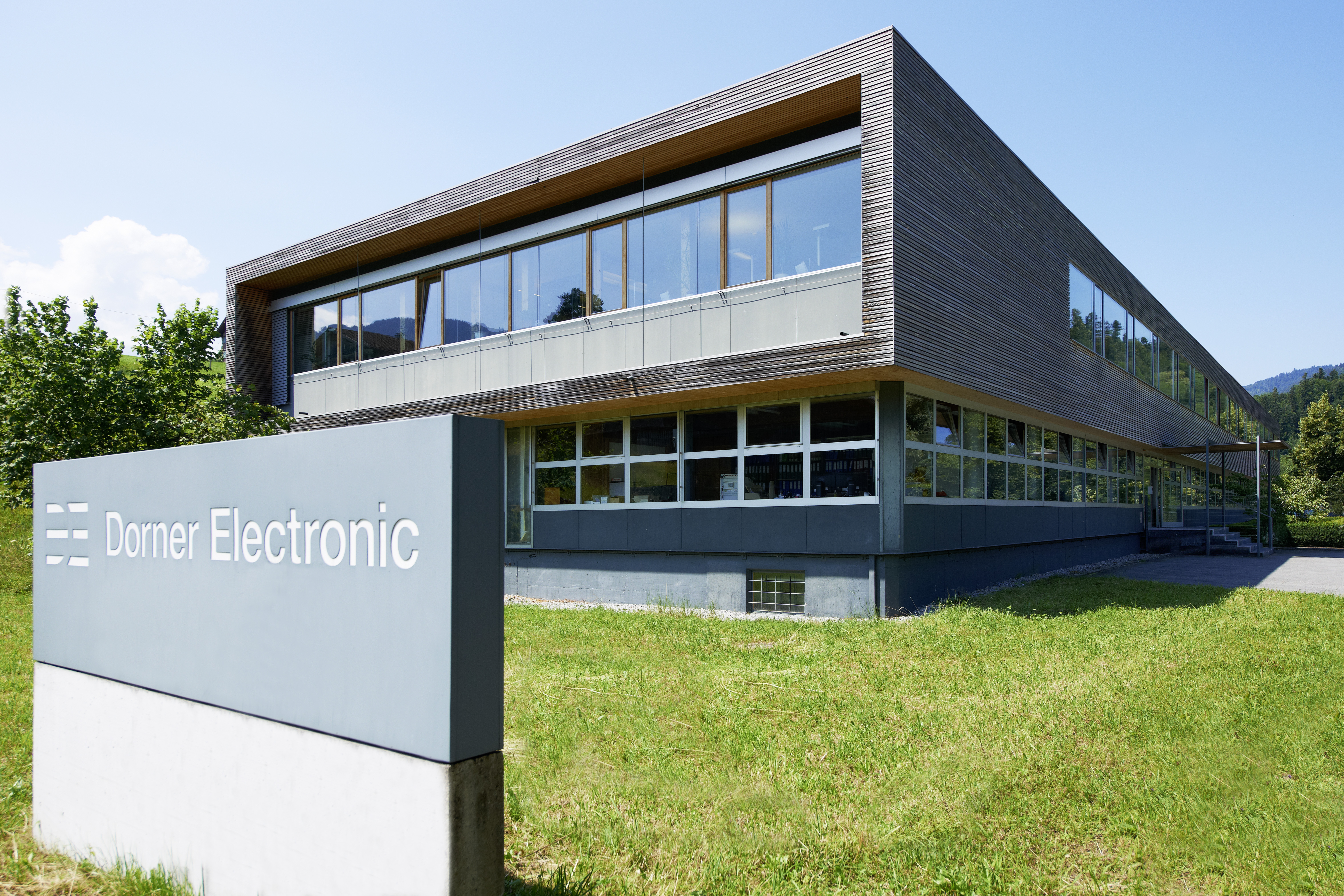 Gebäude im Jahr 2011